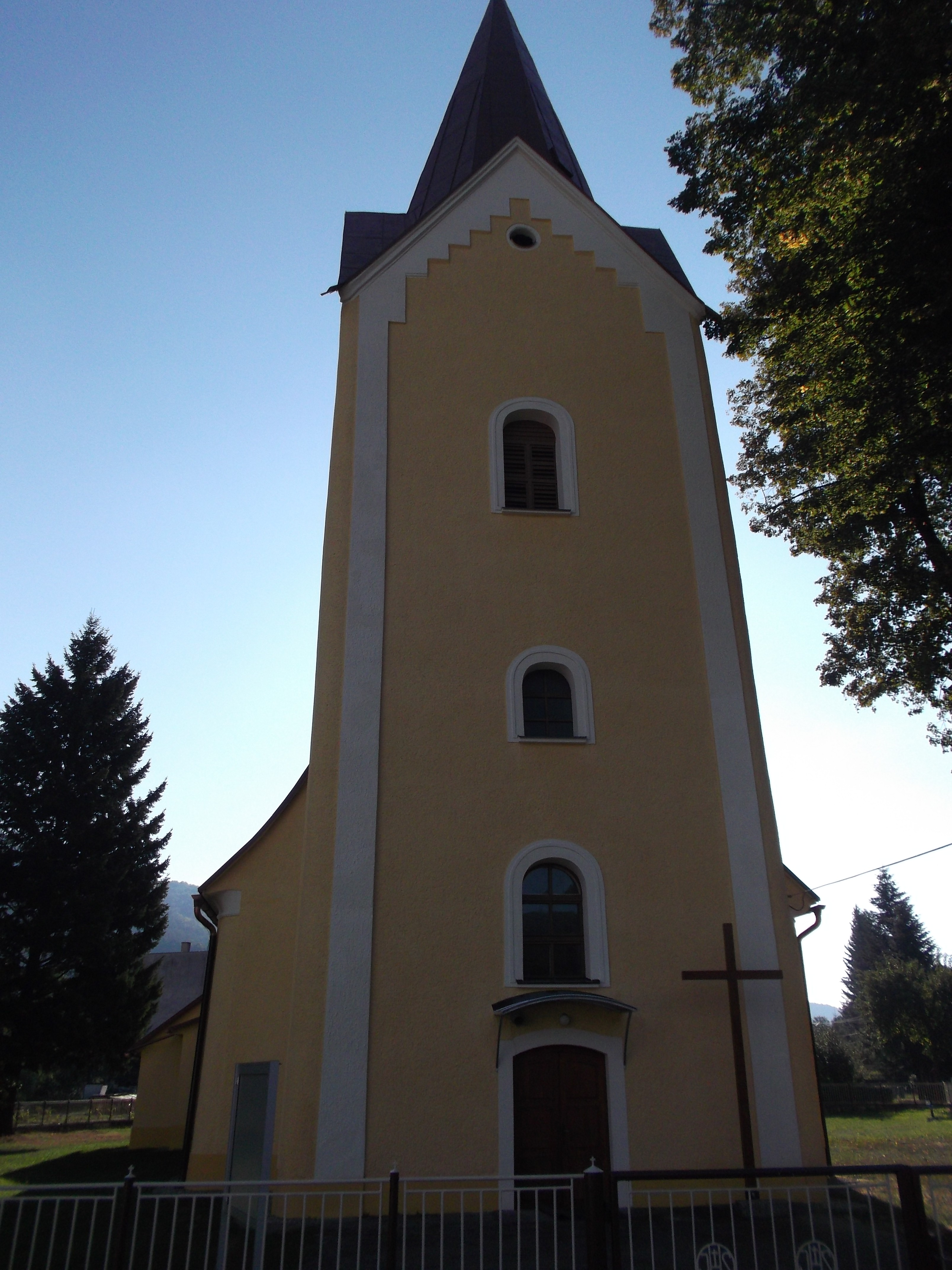 Kostol